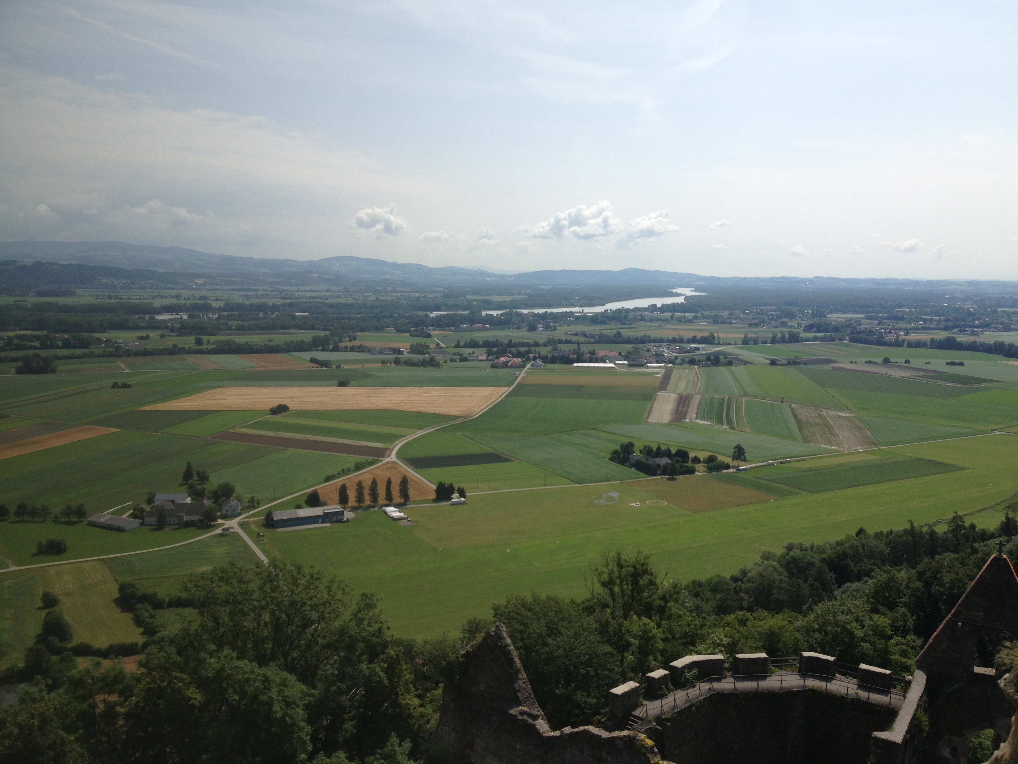 Flugplatz Eferding (Im Vordergrund die Burgruine Schaumburg)